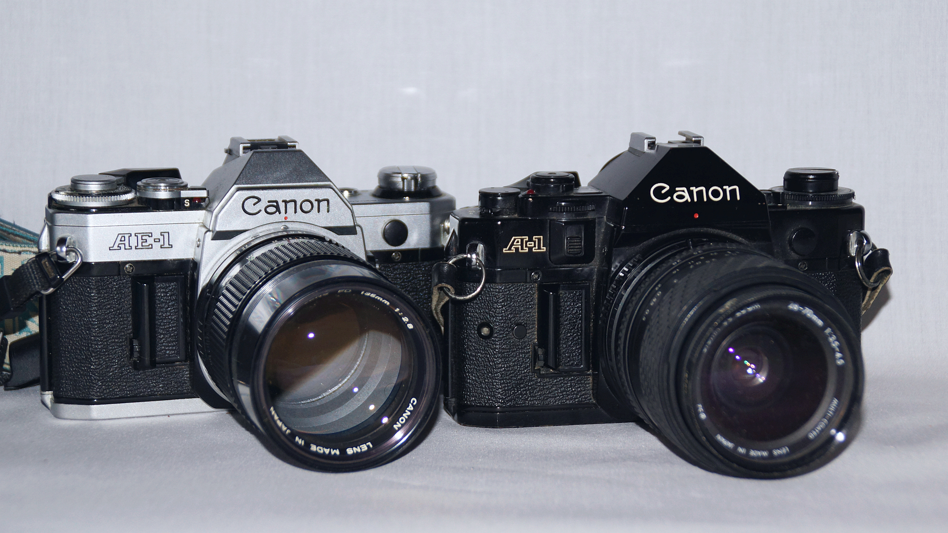 Canon A-series, hier die AE-1 und A-1 - Foto Wolfgang Pehlemann DSC04867